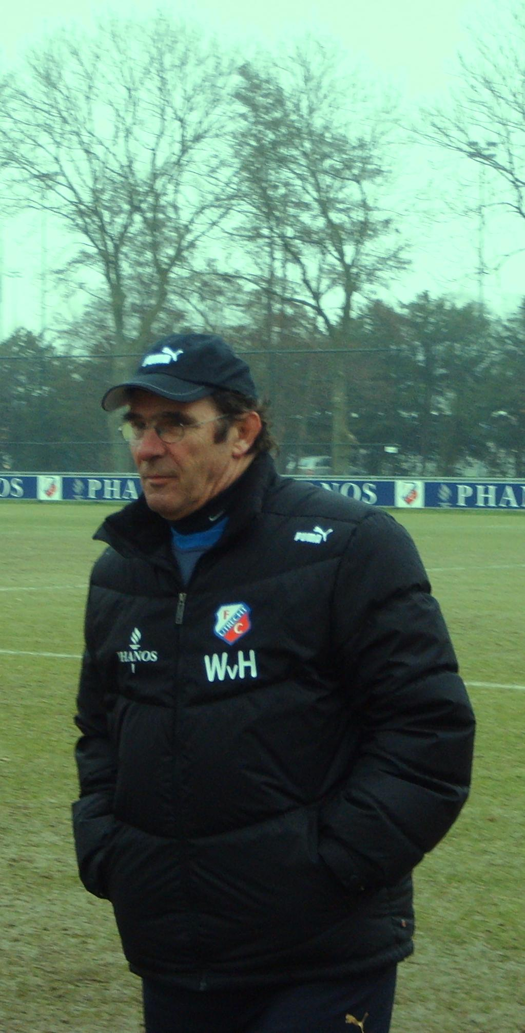 Willem van Hanegem during a training